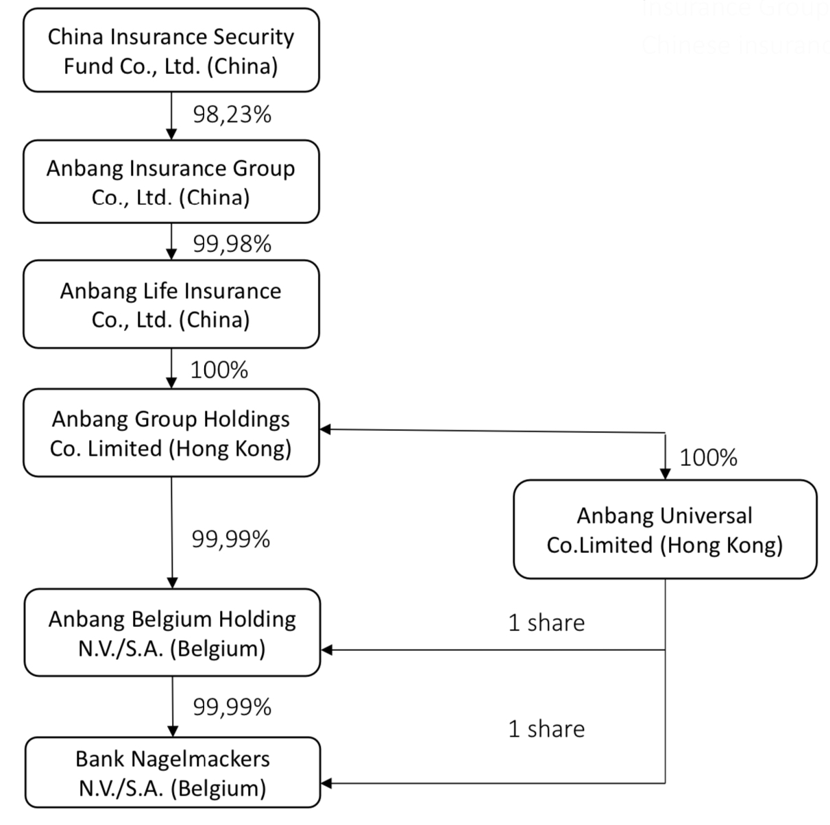 Structuur Anbang en Bank Nagelmackers 2020